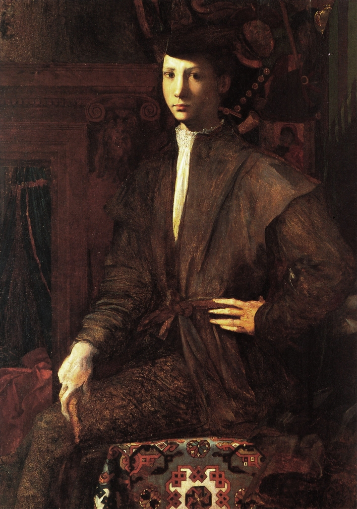 Il Ritratto di giovane seduto su tappeto di Rosso Fiorentino, è un dipinto (olio su tavola, cm 120 x 86) facente parte della Collezione Farnese, ggi a Napoli nel Museo Nazionale di Capodimonte (inv. Q 112), nella Galleria Farnese. Raffigura un giovane sconosciuto, seduto su un tavolino coperto da un prezioso panno turchesco. Sullo sfondo affiorano particolari dell'interno, come la cornice architettonica del caminetto, l'arazzo o l'icona bizantina, che suggeriscono un'ambientazione tipicamente umanistica. La stesura veloce conferisce poi al soggetto un aspetto incompiuto che ne accresce l'intensità emotiva, particolarmente evidente nelle mani dalle dita allungate e adunche.